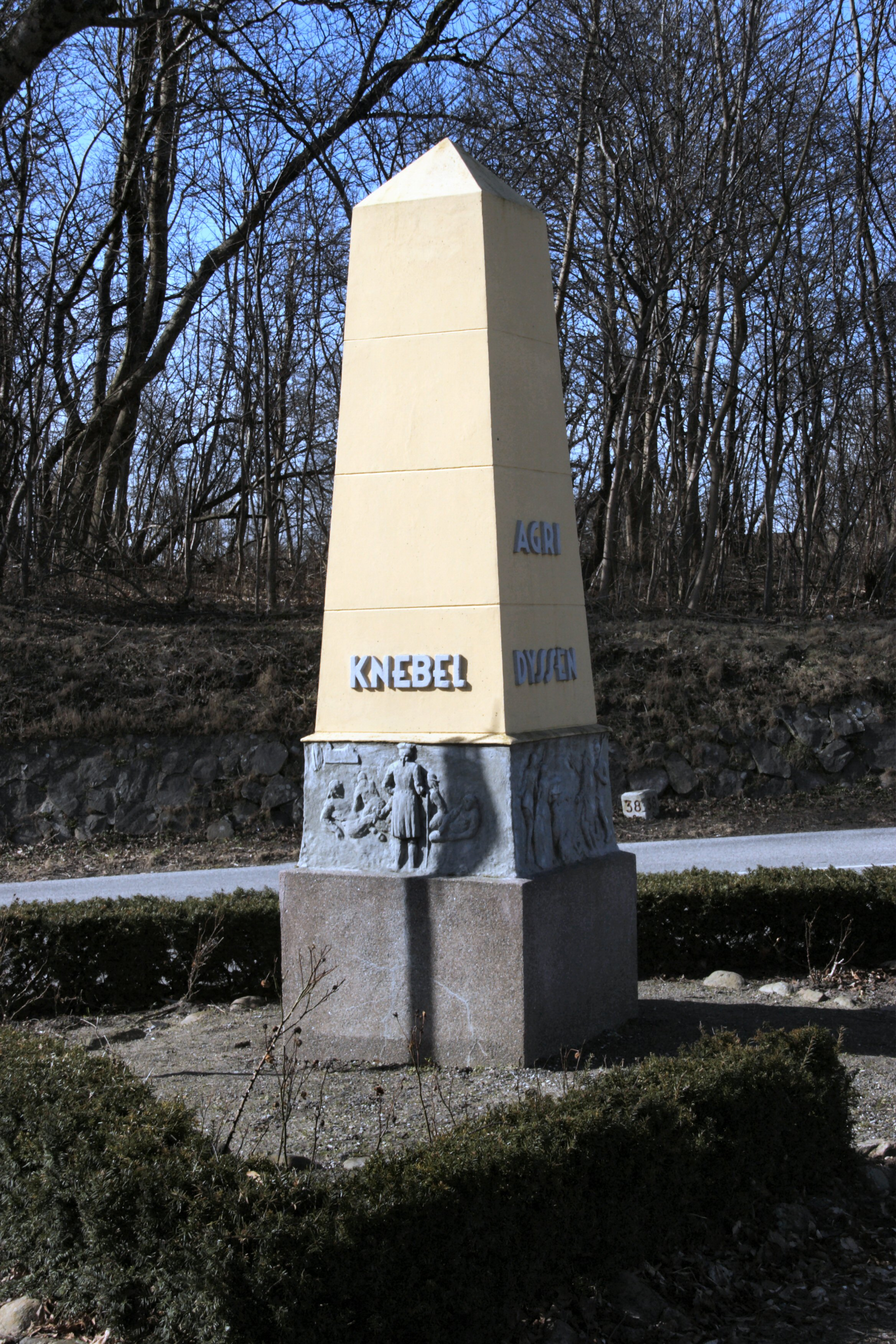 Agri Støtten ved indkørslen fra nord til Knebel